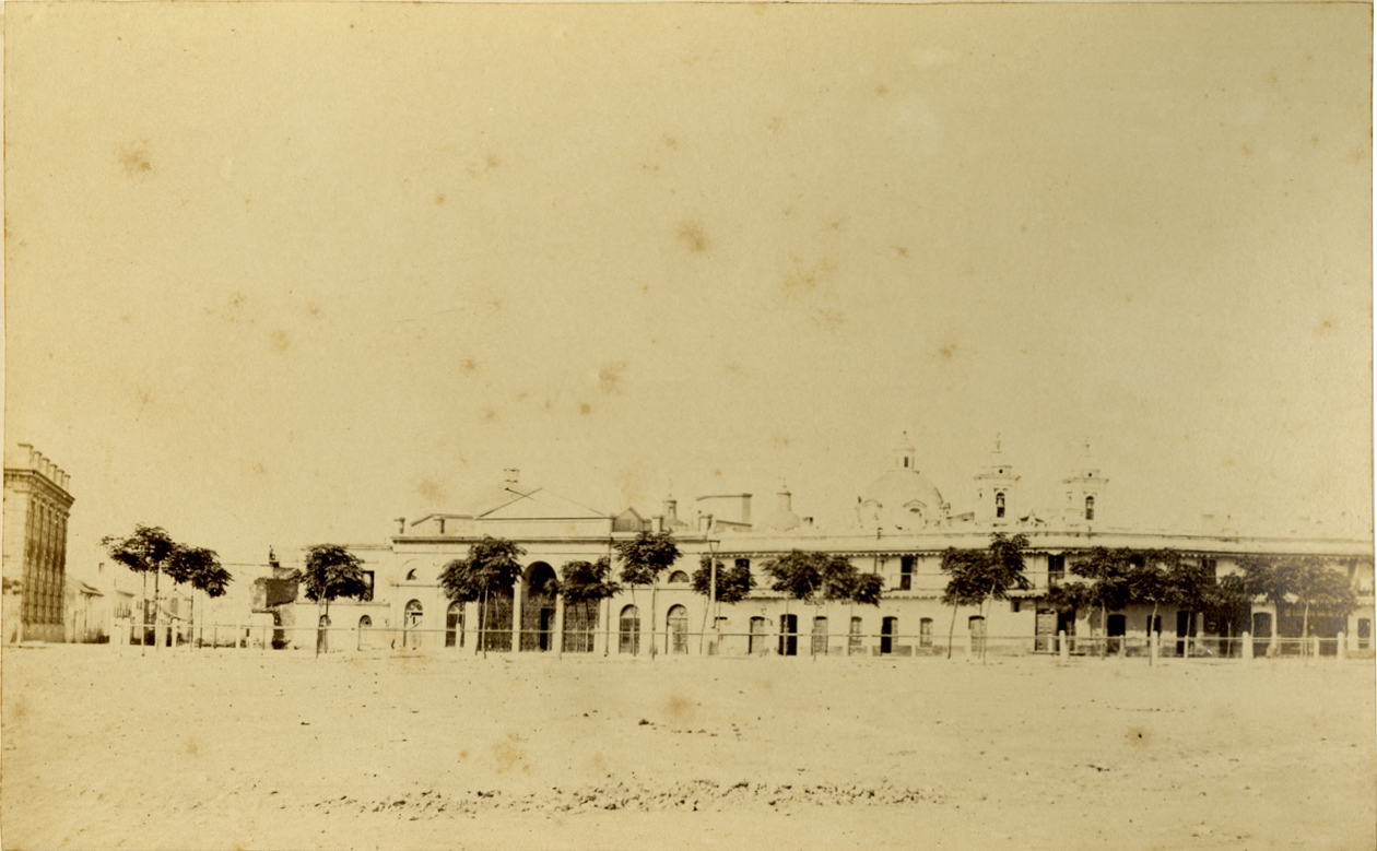 Palacio del Congreso, es el primer edificio al fondo y, a la derecha, la cúpula y las torres de la iglesia de San Francisco. Primera sede del Congreso Nacional, situada en la calle Victoria Nº 318 al 330, hoy Hipólito Yrigoyen. Construída en 1863 por el ingeniero Jonas Larguía. Se realizarón allí las sesiones correspondientes al período 1865 a septiembre de 1905, cuando es reemplazada por el actual edificio. Su estructura original aún se conserva.